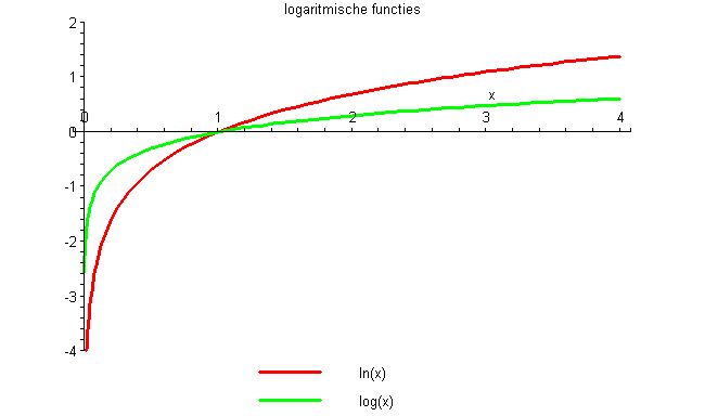 logaritmische functie zelf, Maple 9.5 MADe 3 jun 2005 22:46 (CEST)